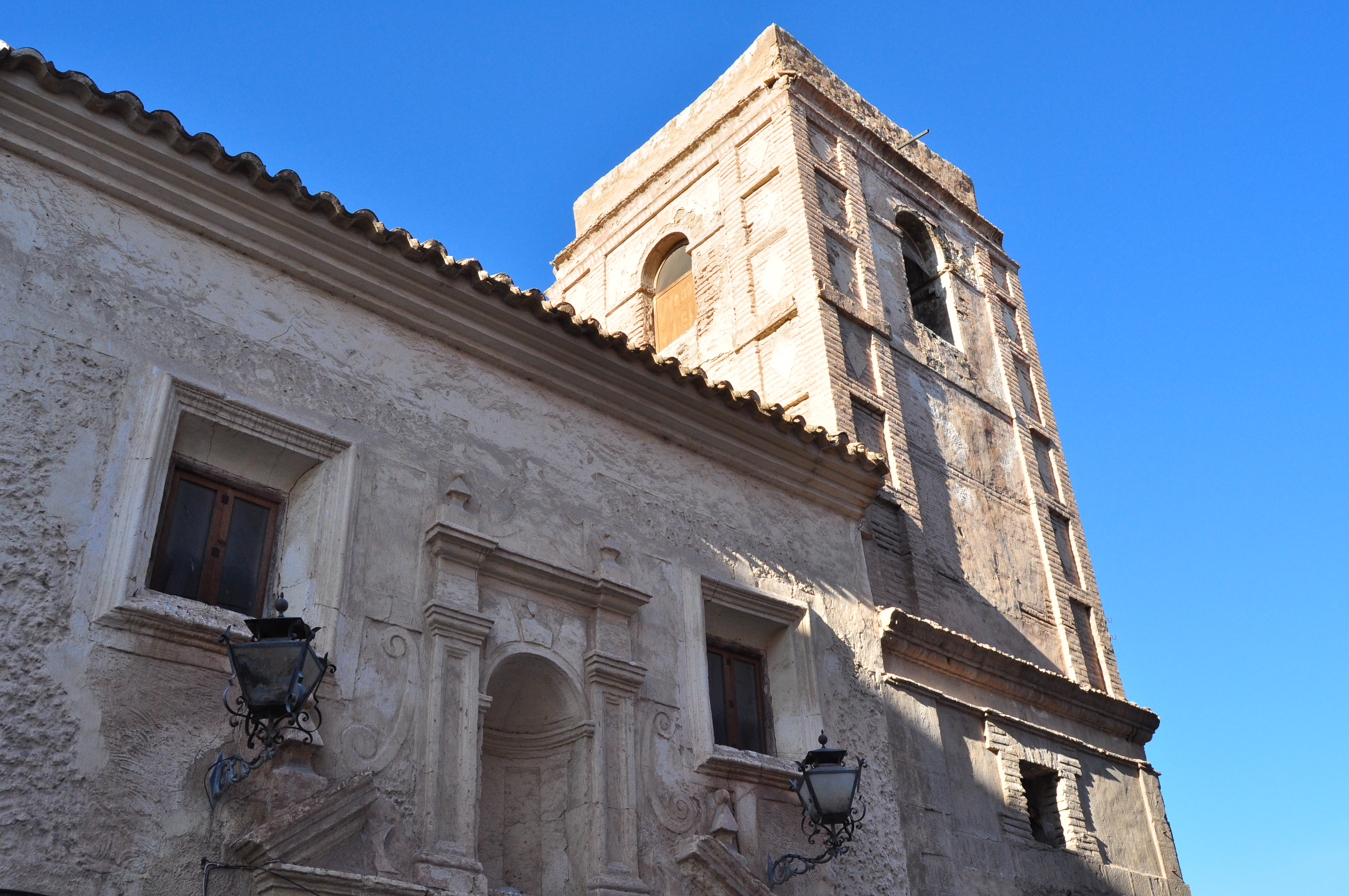 Cuevas de Almanzora - 014 Cuevas del Almanzora, Spain.